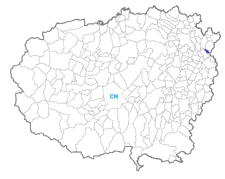 Posizione del comune nella provincia di Cuneo